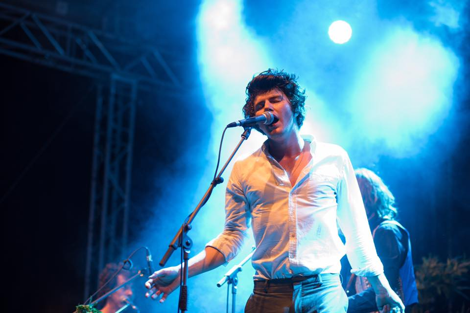 Faber an einem Live-Konzert in Cottbus 2017